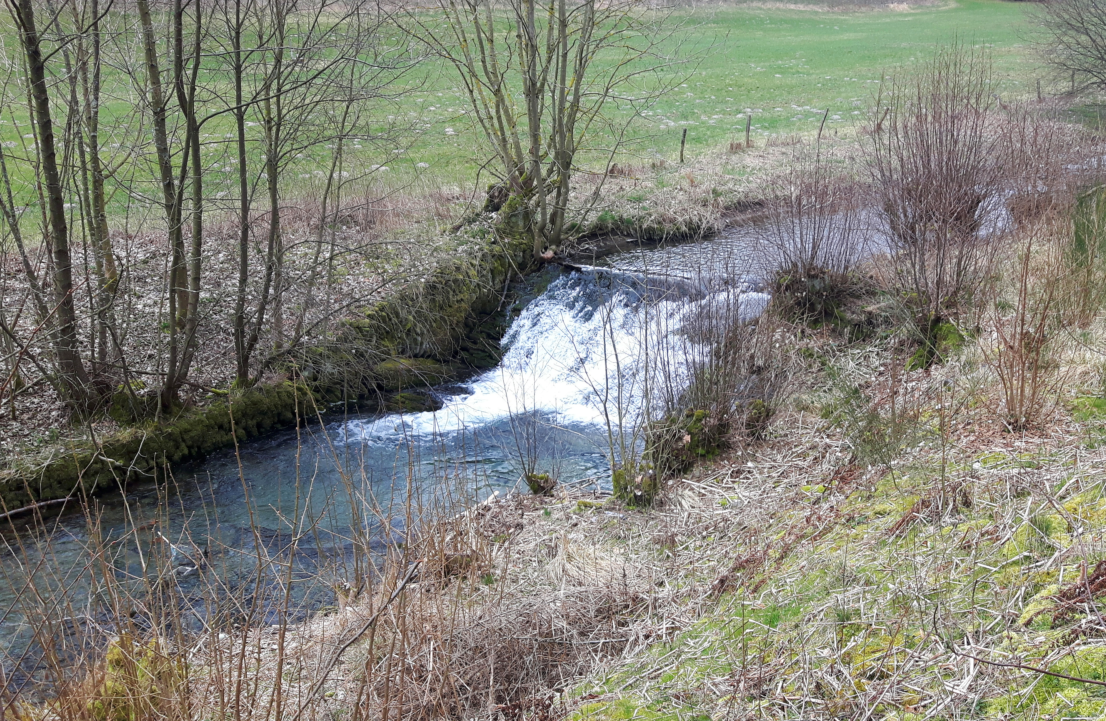 Latrop (Wasserfall) im Naturschutzgebiet Waldreservat Schanze